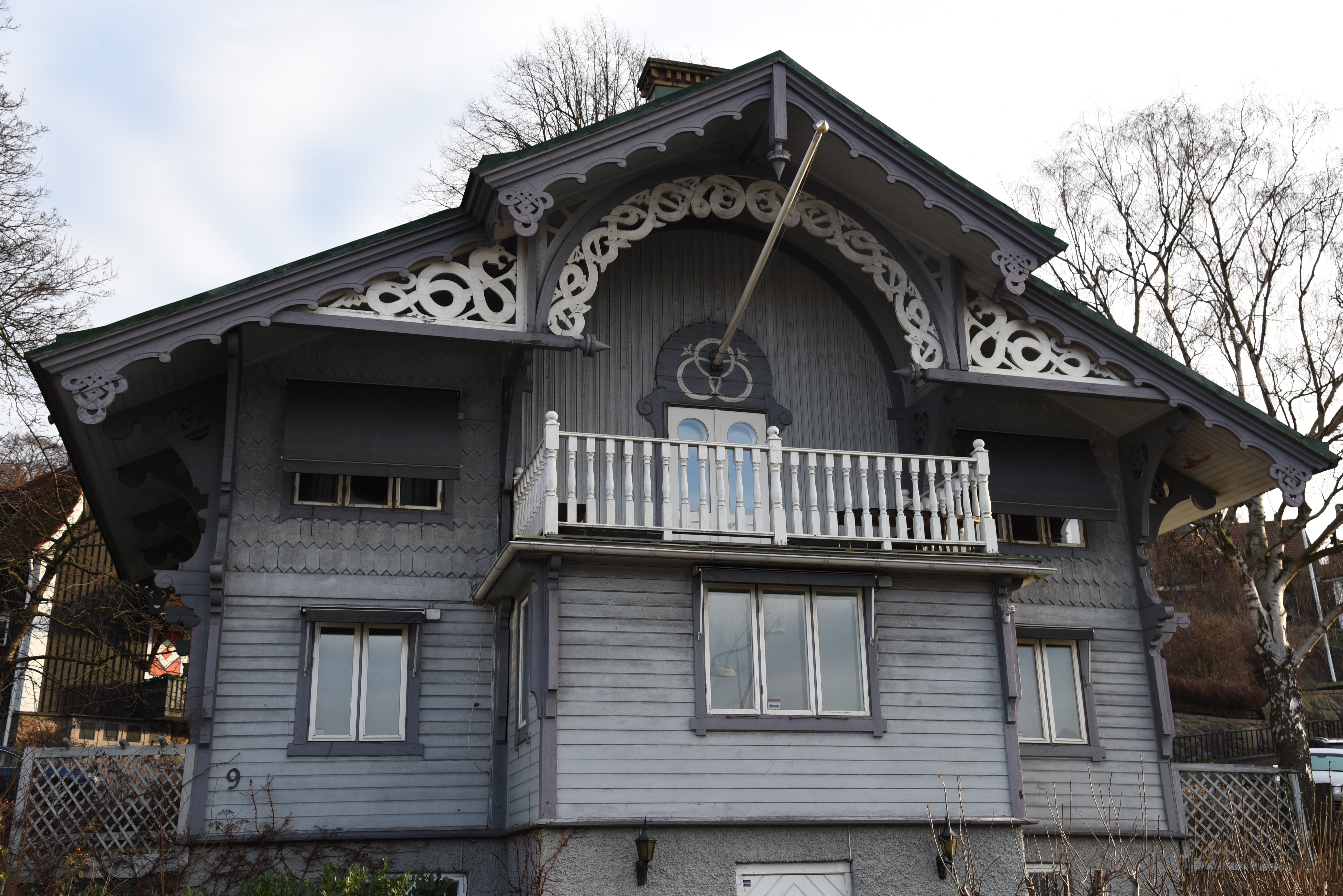 Drakevillan vid Odinslundgatan 9 i stadsdelen Gårda i Göteborg.